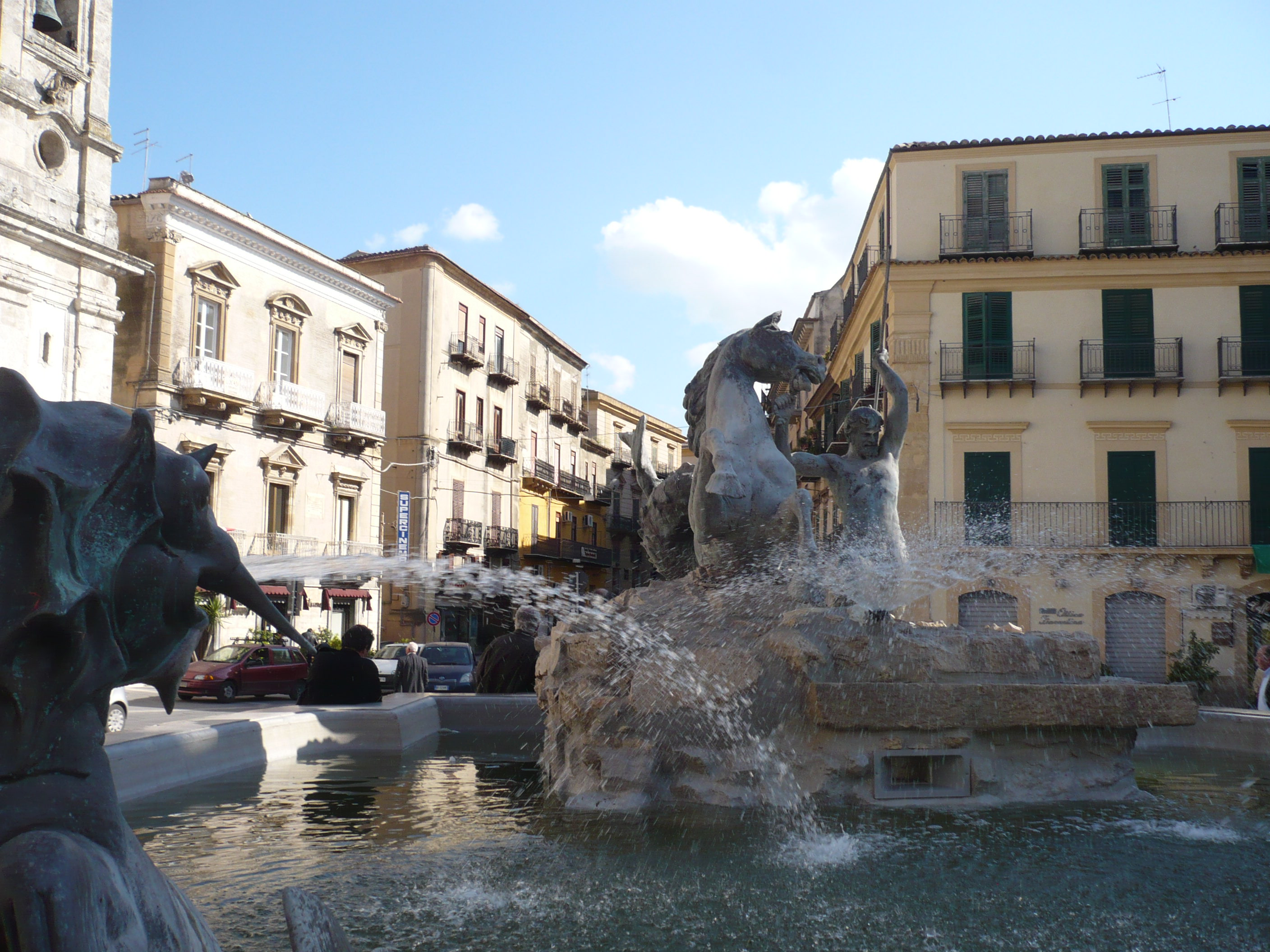 Fontana del Tritone particolare